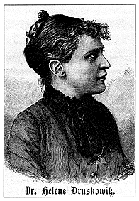 Helene von Druskowitz unbekannter Fotograf, unbekannte Quelle